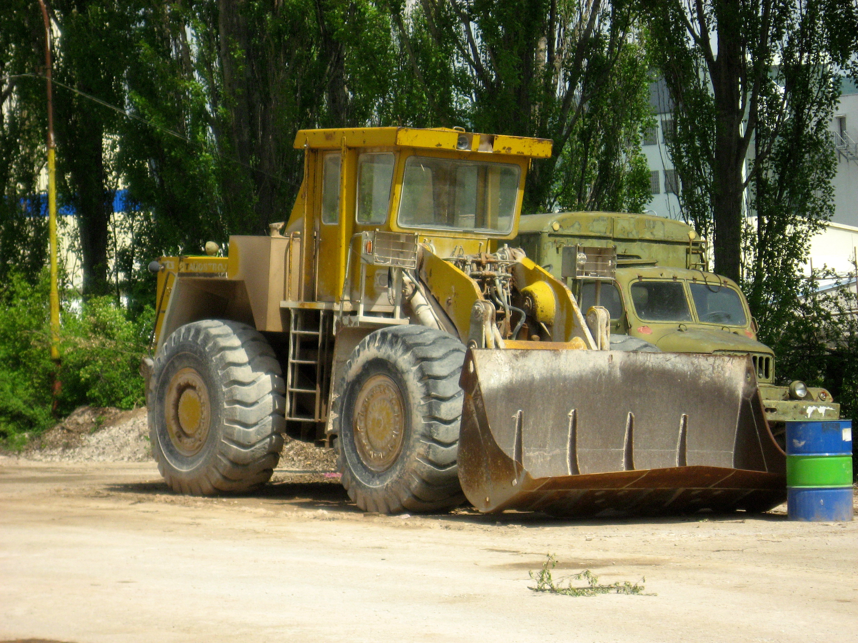 Kolový nakladač Stavostroj KNB 250 ve vápence v Čebíně